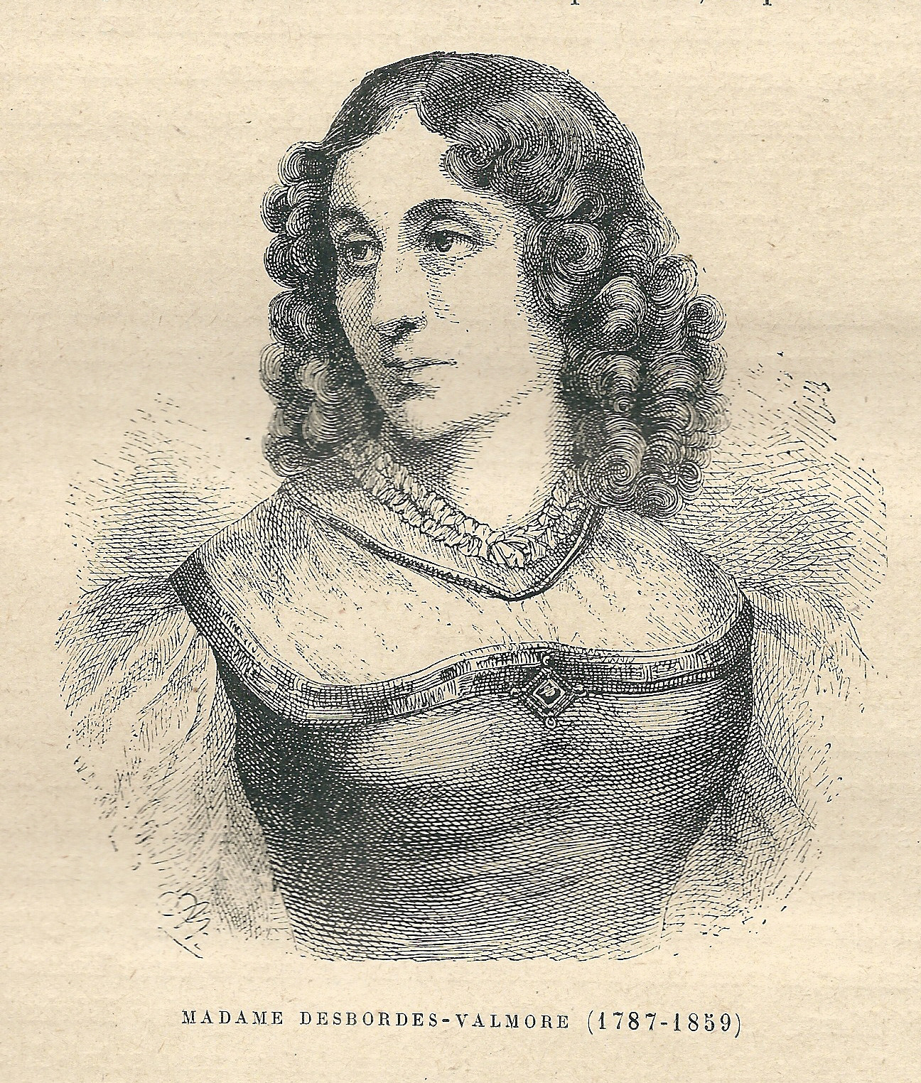 Marceline Desbordes-Valmore ; dessin